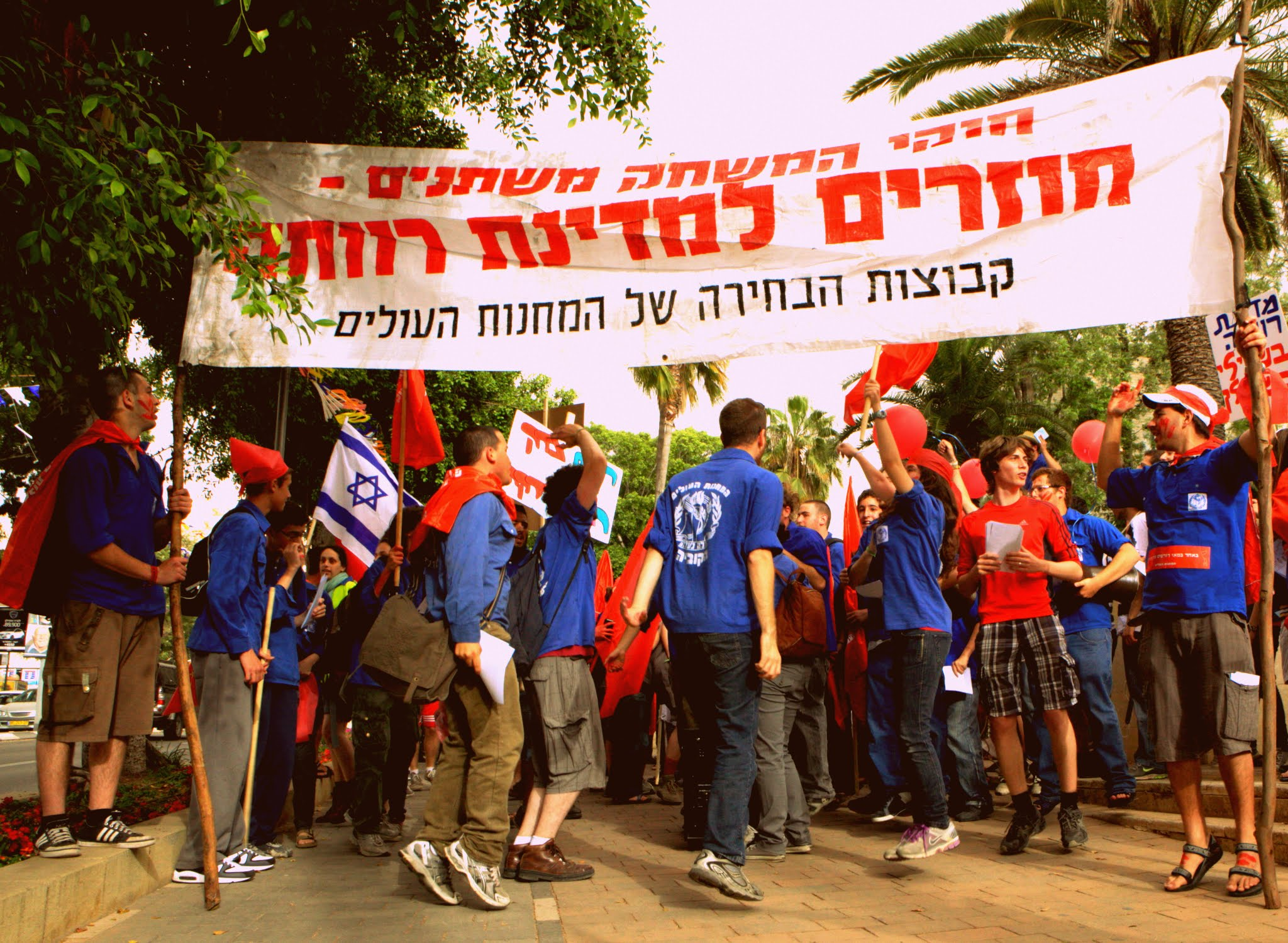 חניכים בהפגנת ה-1 במאי